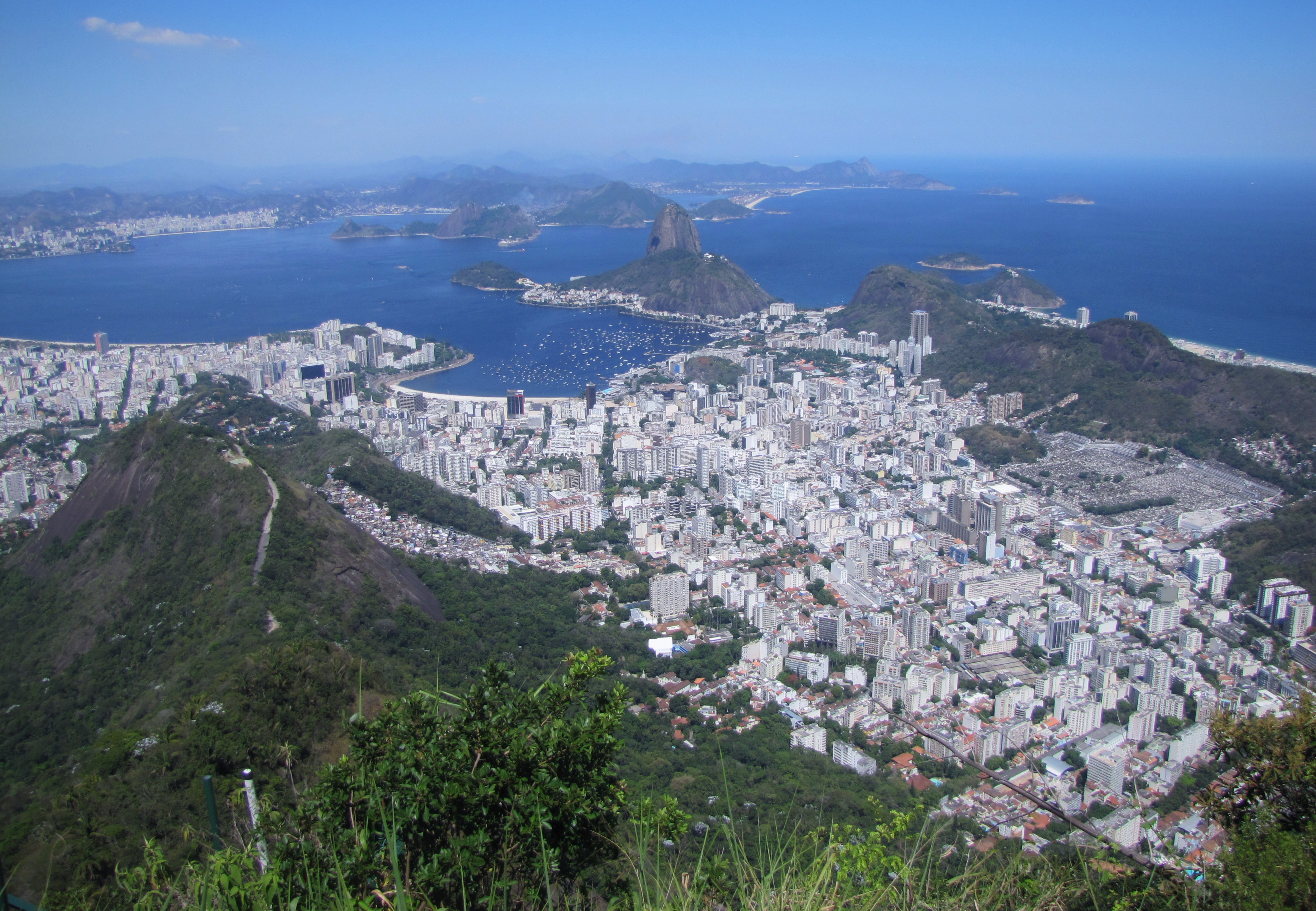 Vista do alto do morro do Corcovado(Floresta da Tijuca)